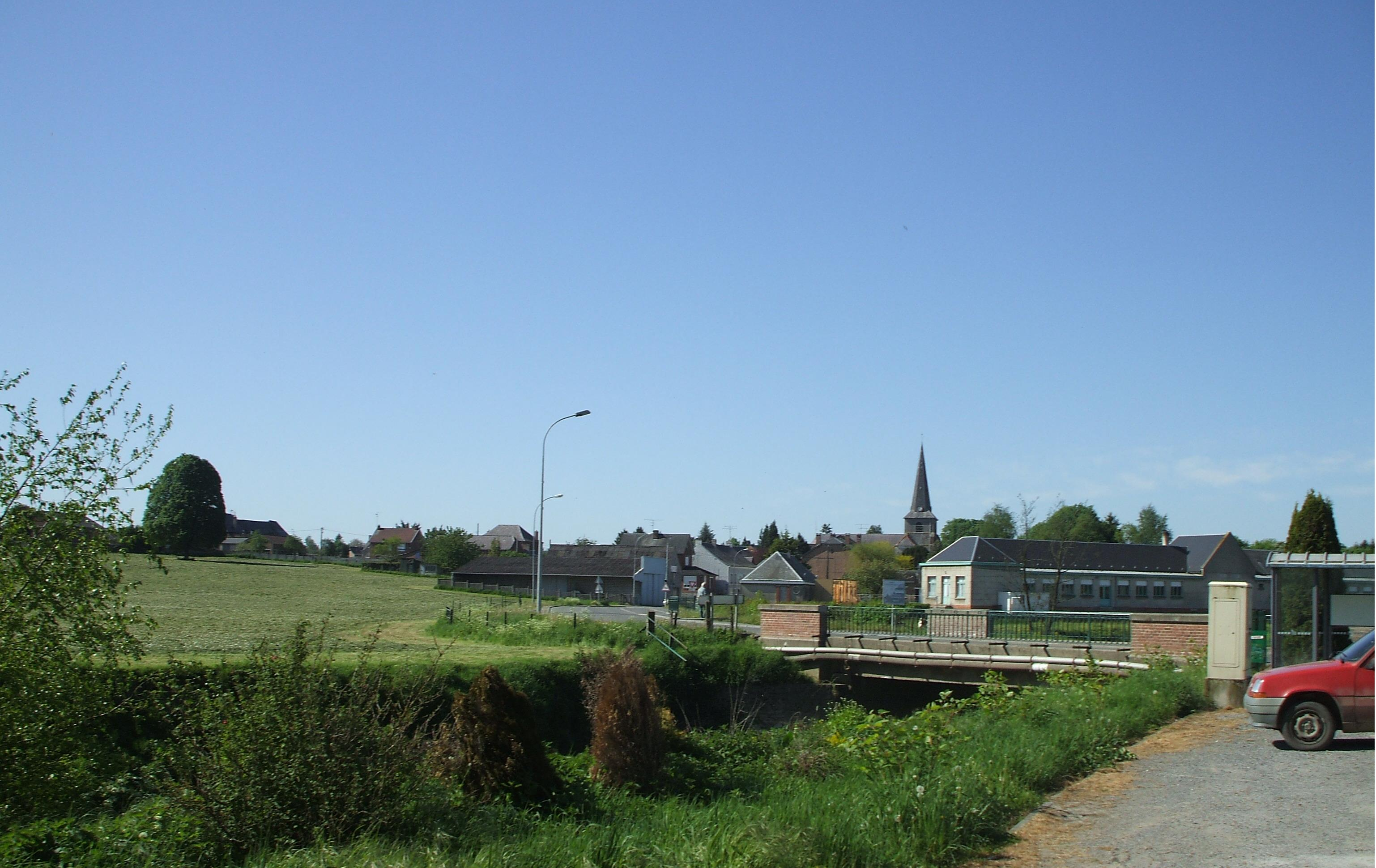 vue de Image: Église Cartignies.JPG